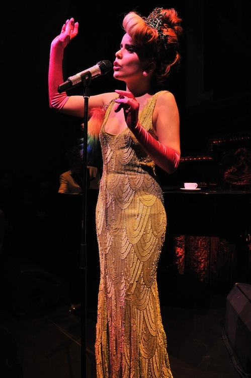 Paloma Faith en París.